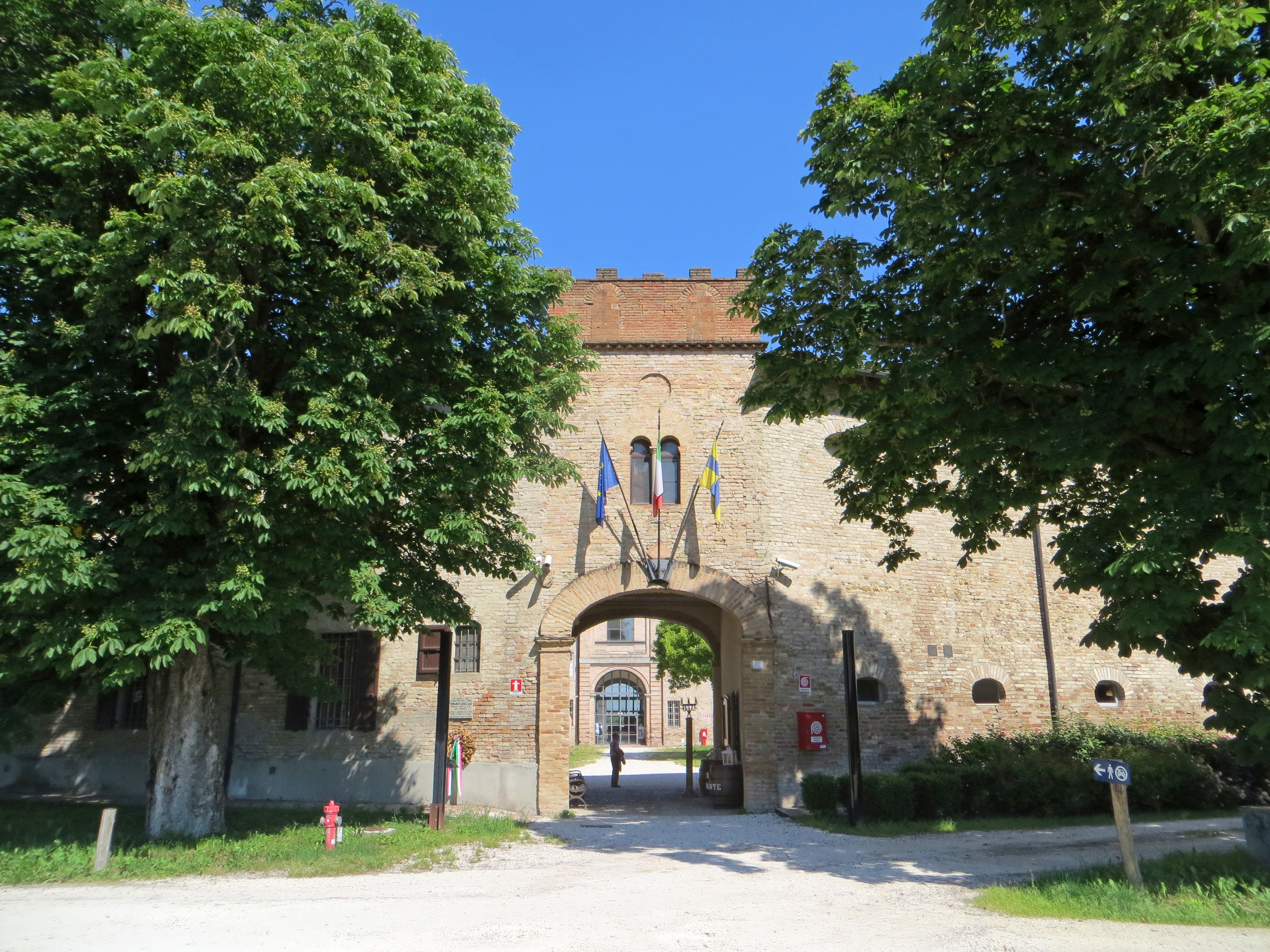 Abbazia di Valserena (Paradigna - Parma) - ingresso alla corte